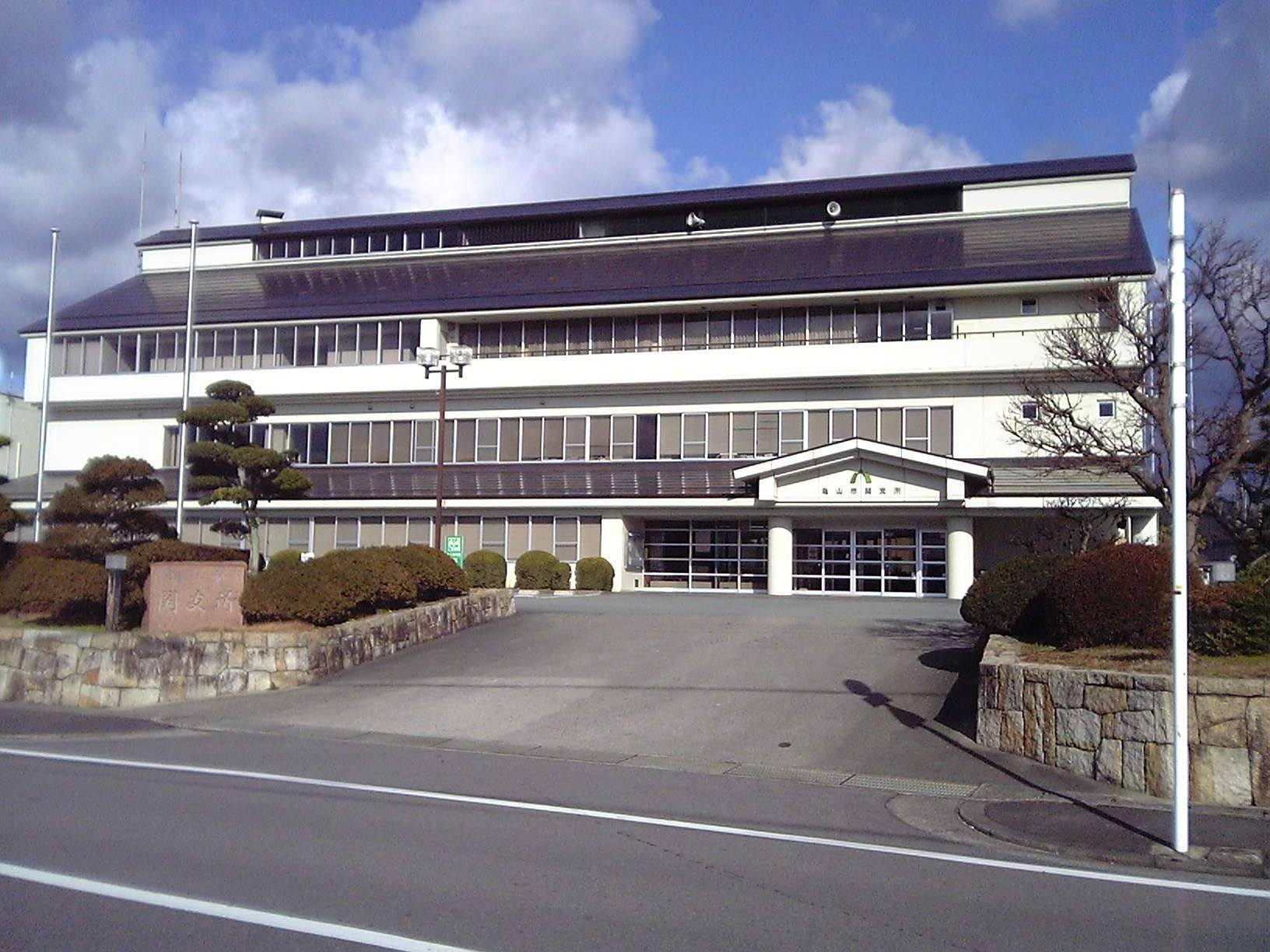 三重県亀山市関支所